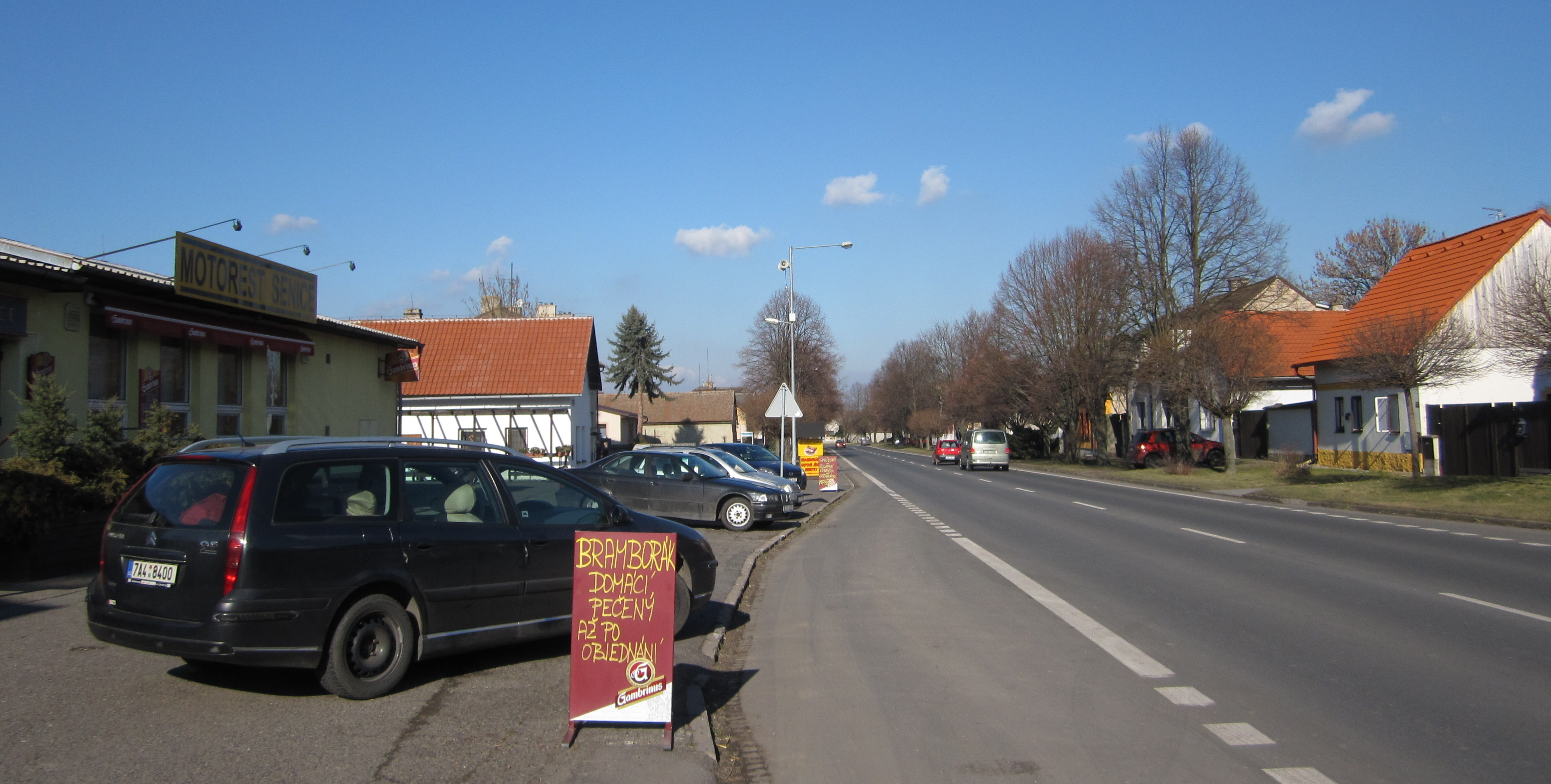 Senice